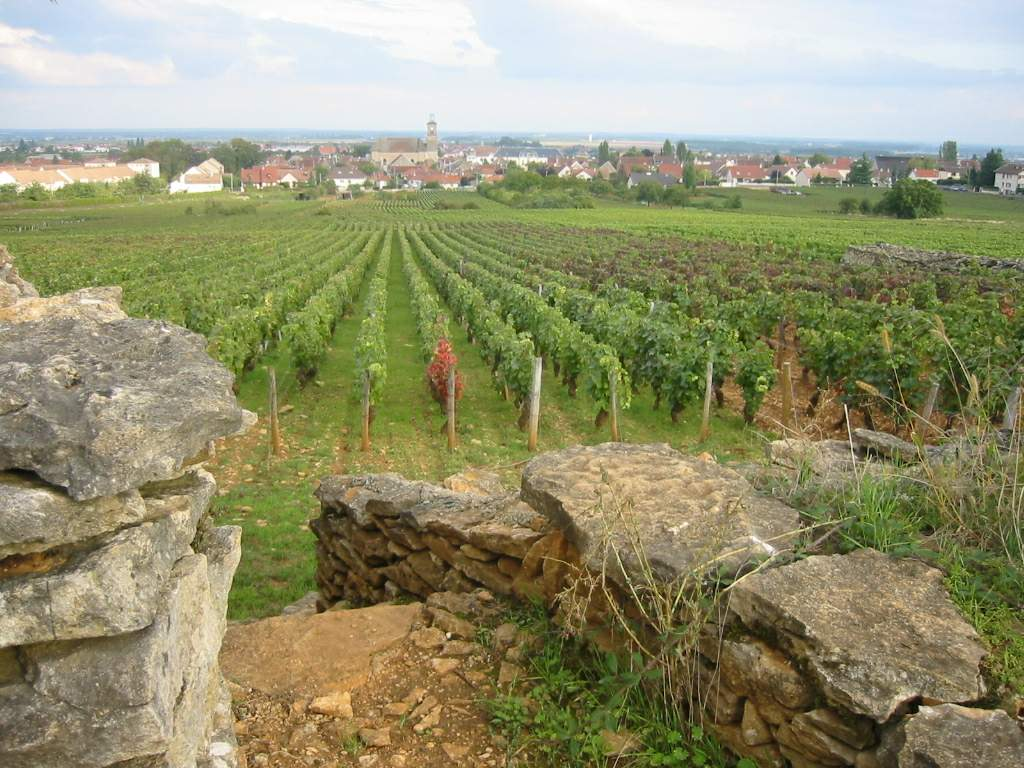 Vigne Marsannay la Cote Bourgogne 4